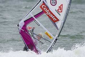 Andre Paskowski